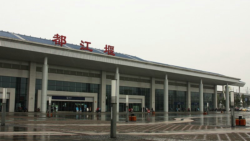 都江堰火车站